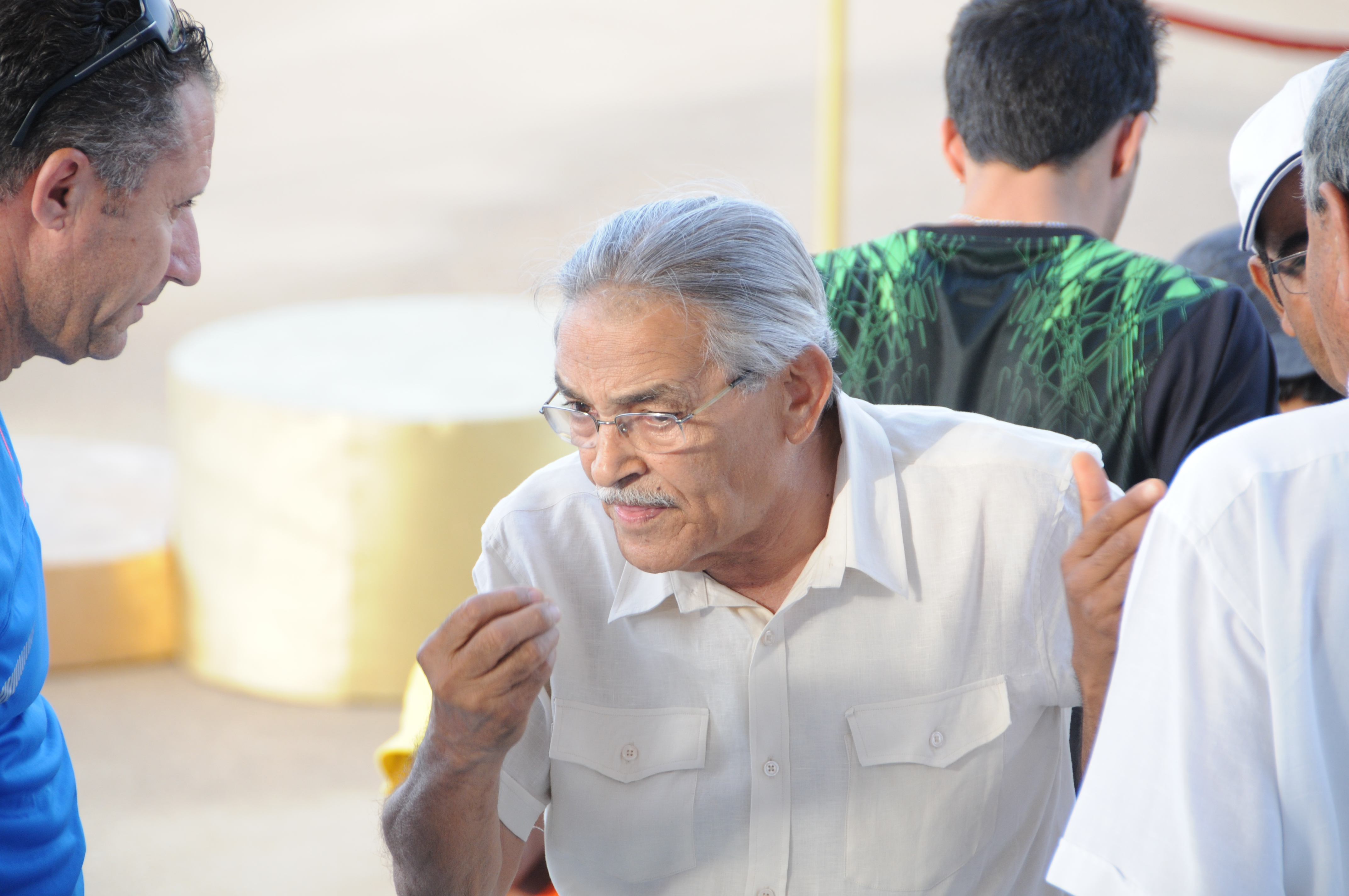 Younes Chetali, président du comité olympique tunisien au stade d'Athlétisme de Radès.